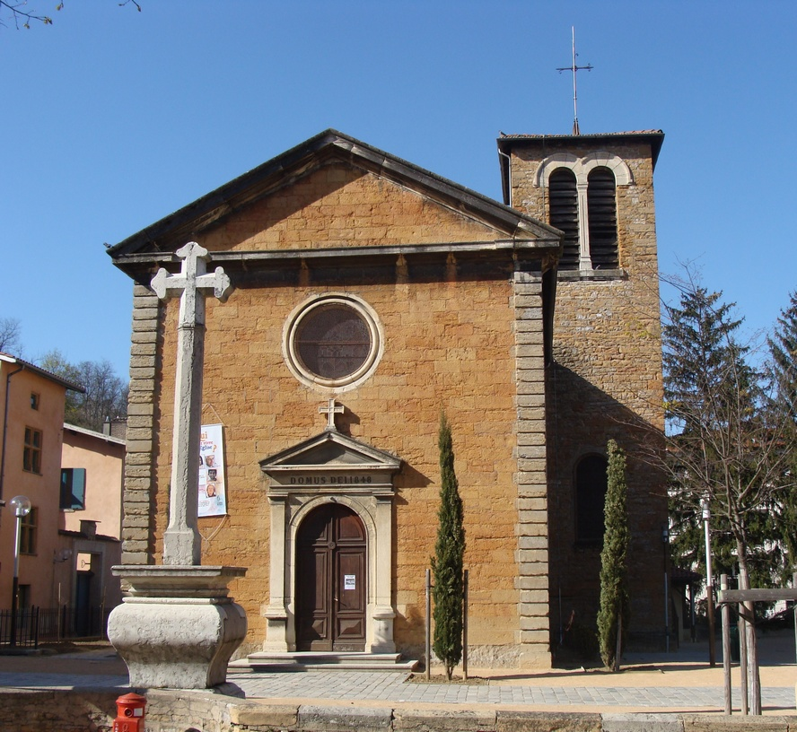 L'église d'Albigny, vue extérieure